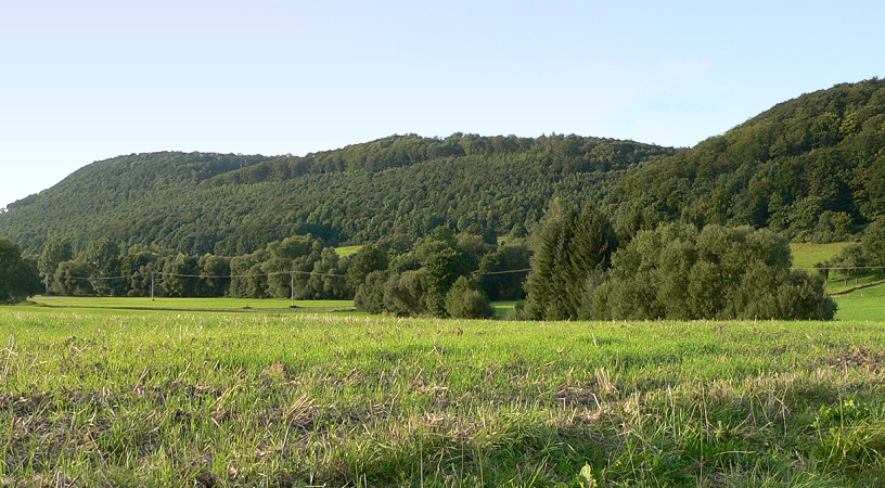 Amtsberge mit Burgruine Hunnesrück, auf mittlere Erhöhung